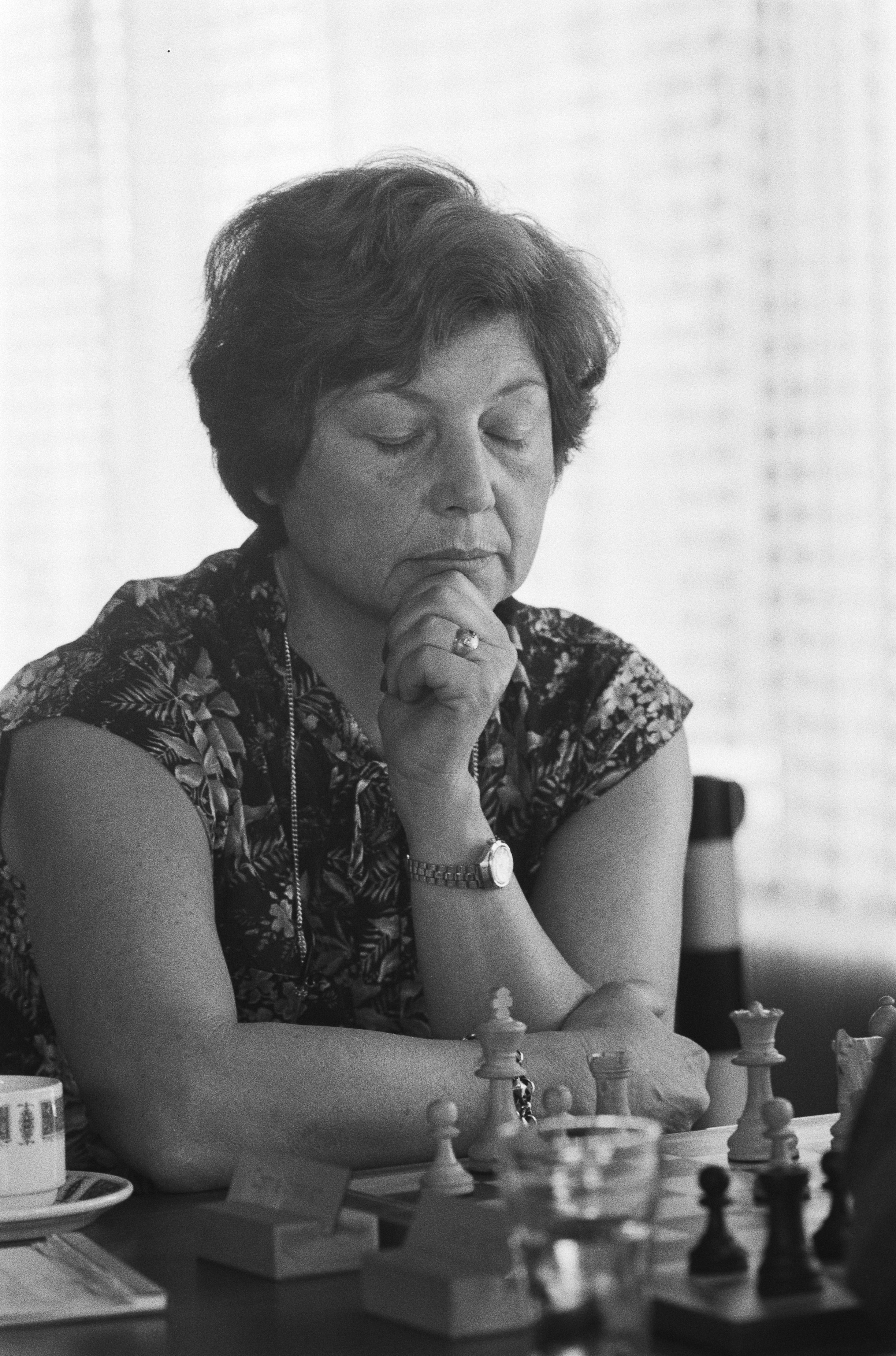 Nederlandse kampioenschappen schaken dames 1982; Corrie Vreeken.